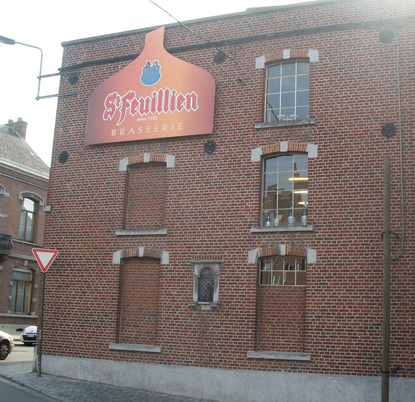 Brasserie Saint Feuillien - Le Roeulx - Henegouwen - België